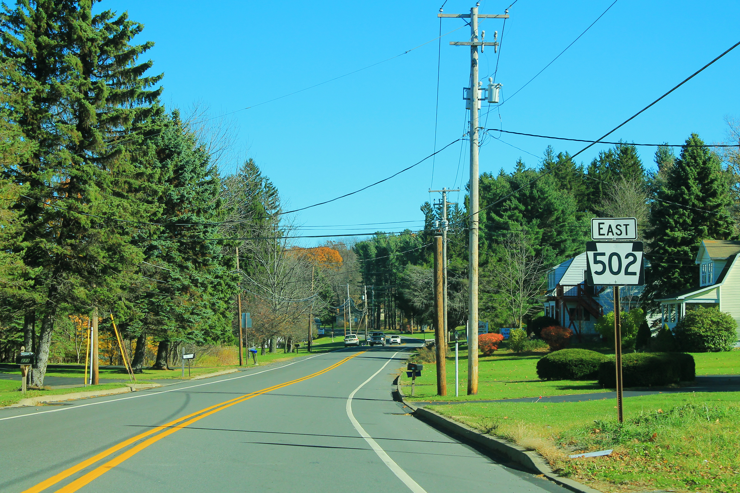 PA 502 Sign